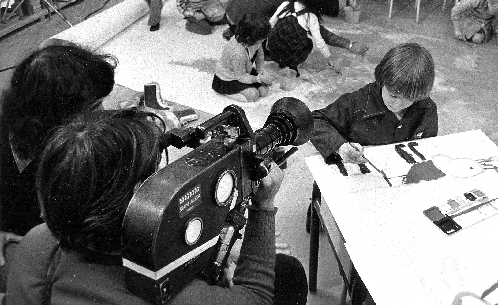 Caméra française Éclair 16 autosilencieuse (Noiseless Portable Reflex), tenue à l'épaule.